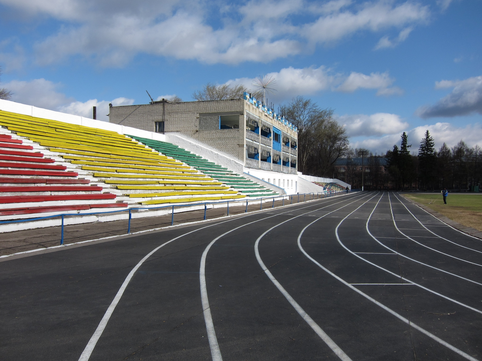 Treadmills